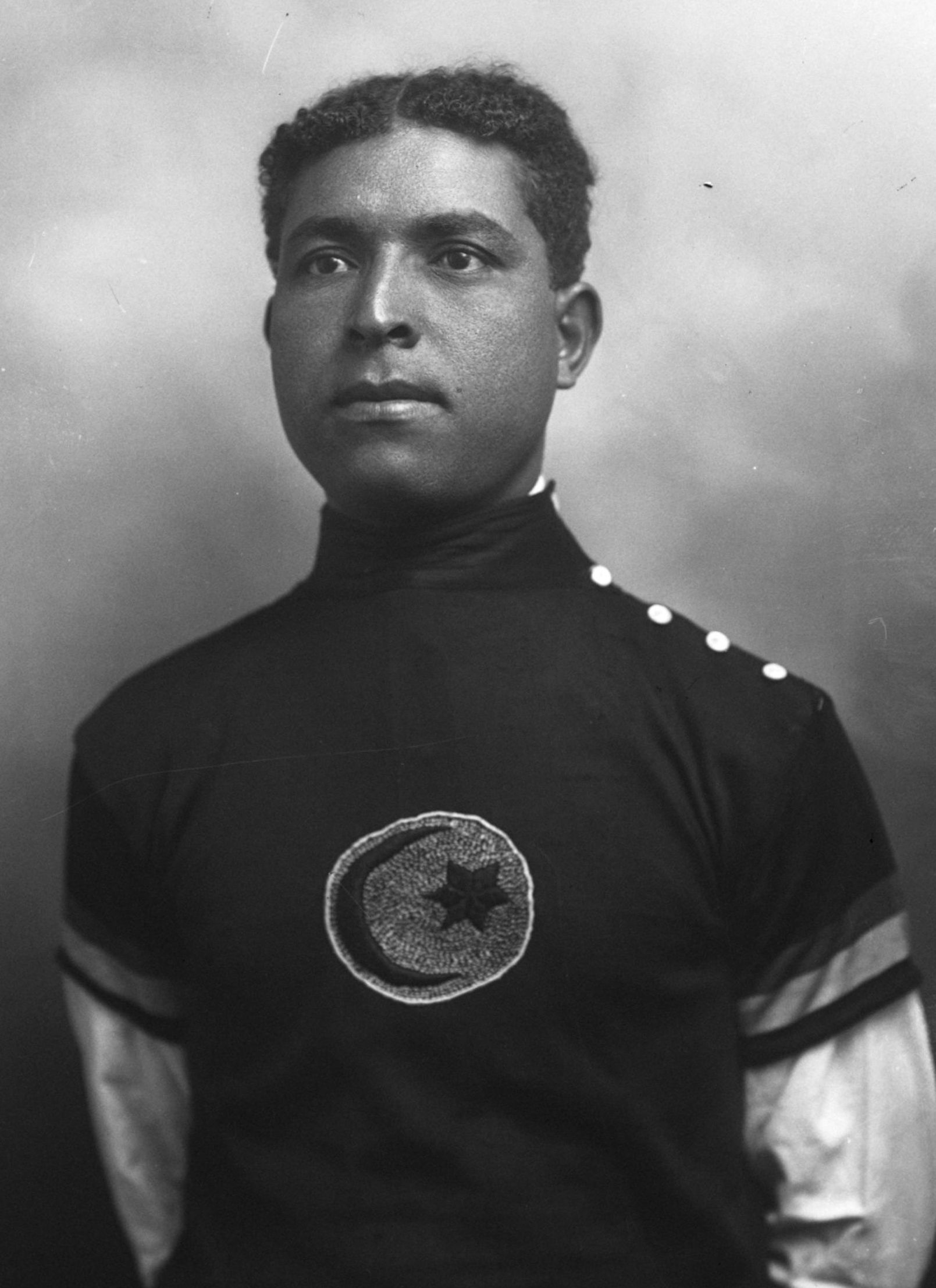 Ali Neffati portrait du coureur cycliste avant le départ